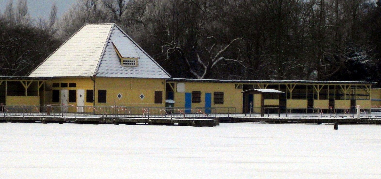 Freibad an der Falkenwiese in Lübeck, Dezember 2010, aufgenommen vom Ostufer der Wakenitz